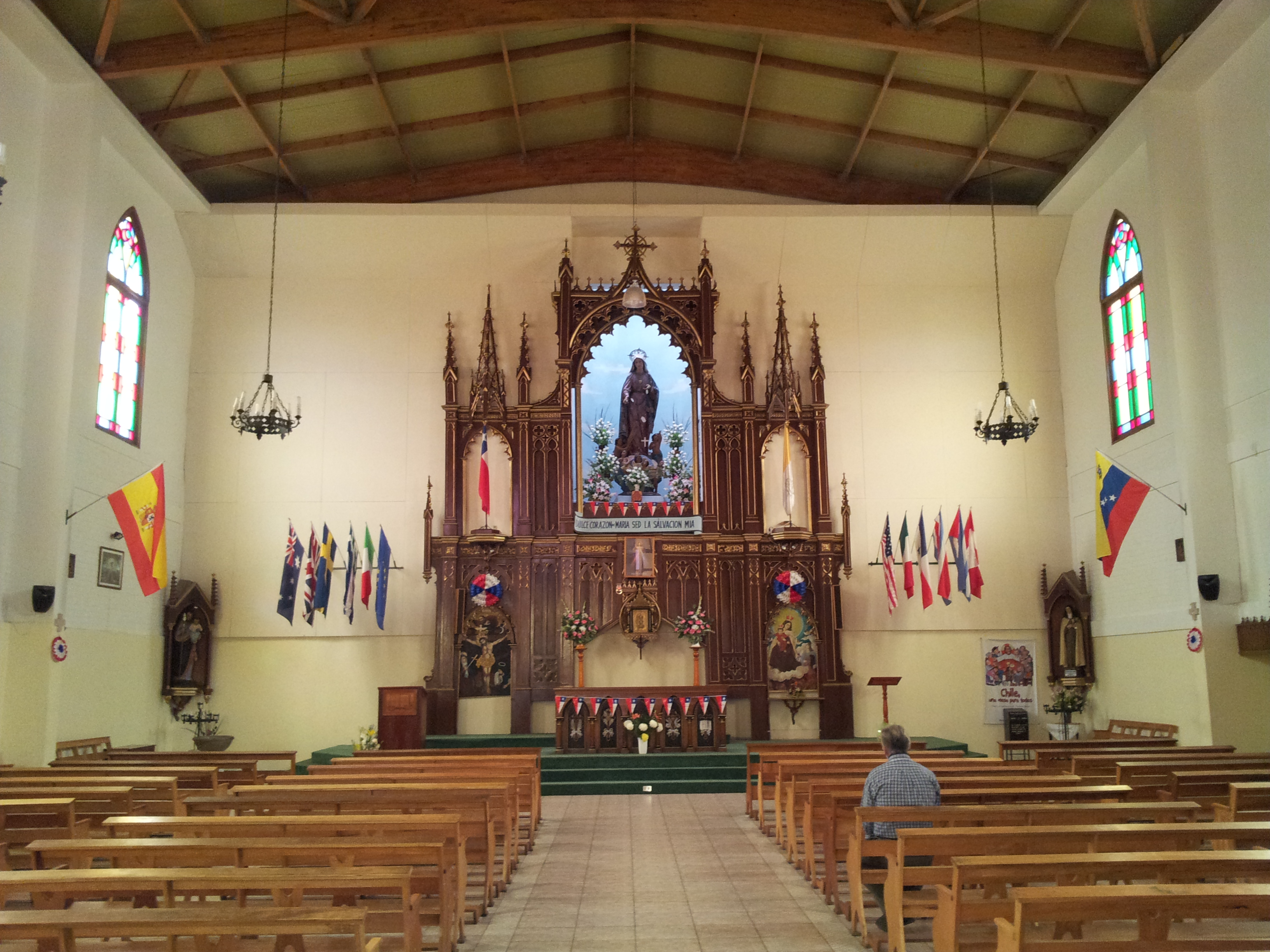 Iglesia del Corazón de María This is a photo of a national monument in Chile: 580